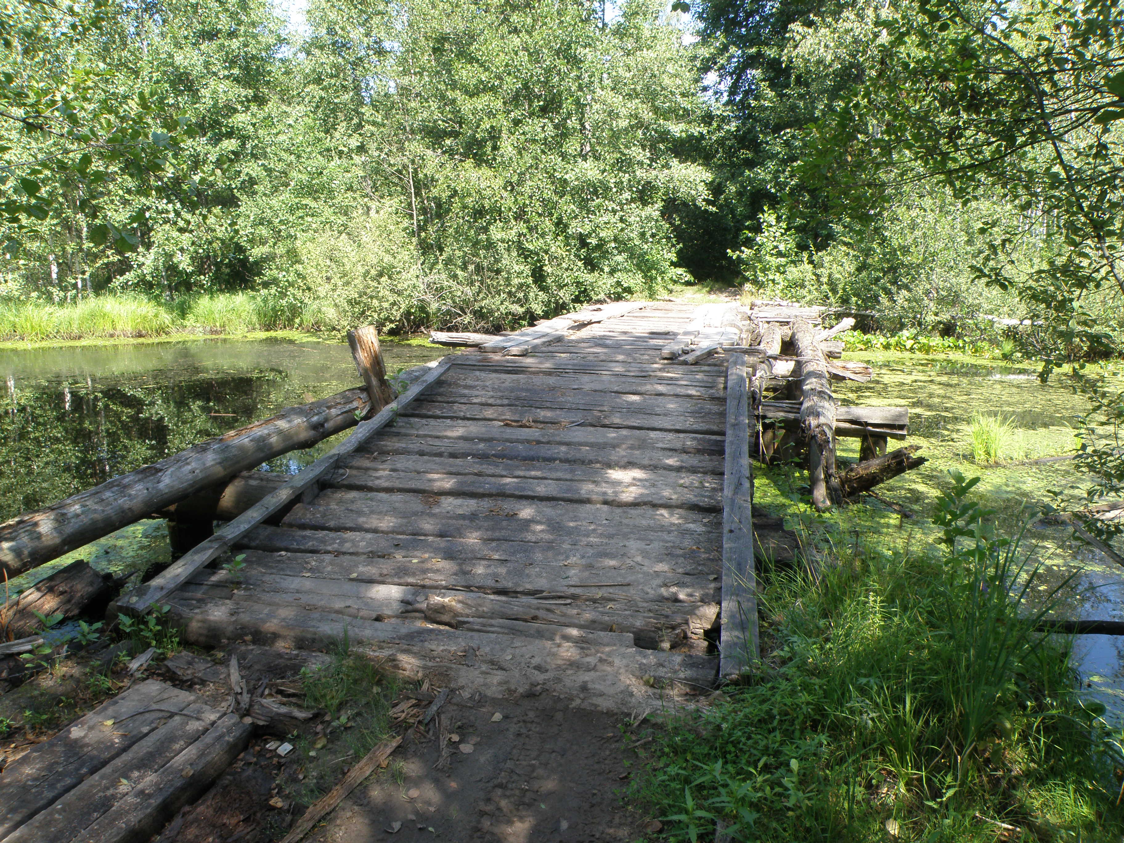 Благой мост (лесная дорога Тихоново - Ильичёво)